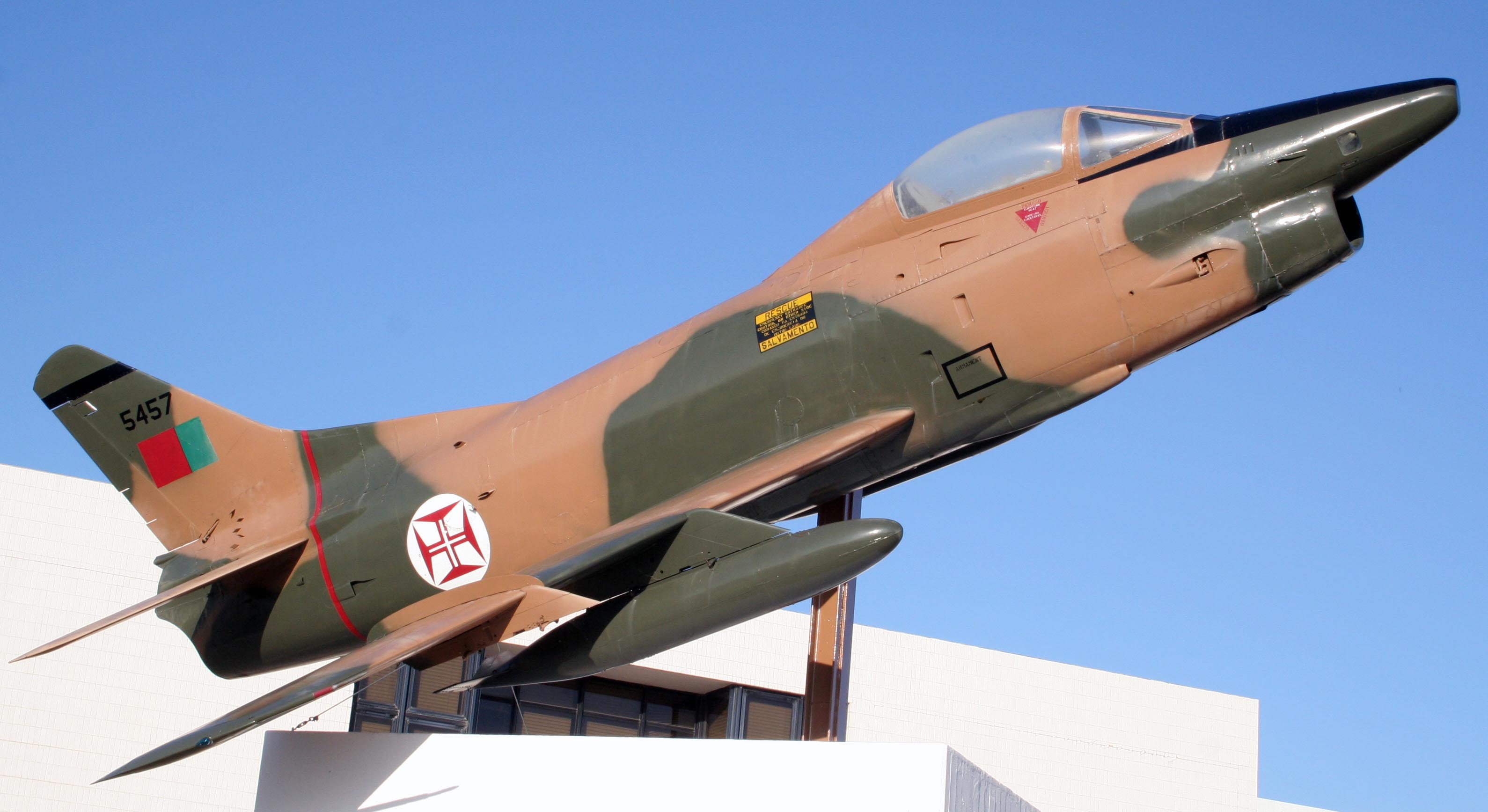 Fiat G-91 Portuguese Air Force Military Aircraft - Fiat G-91 Source/Author Soares da Silva